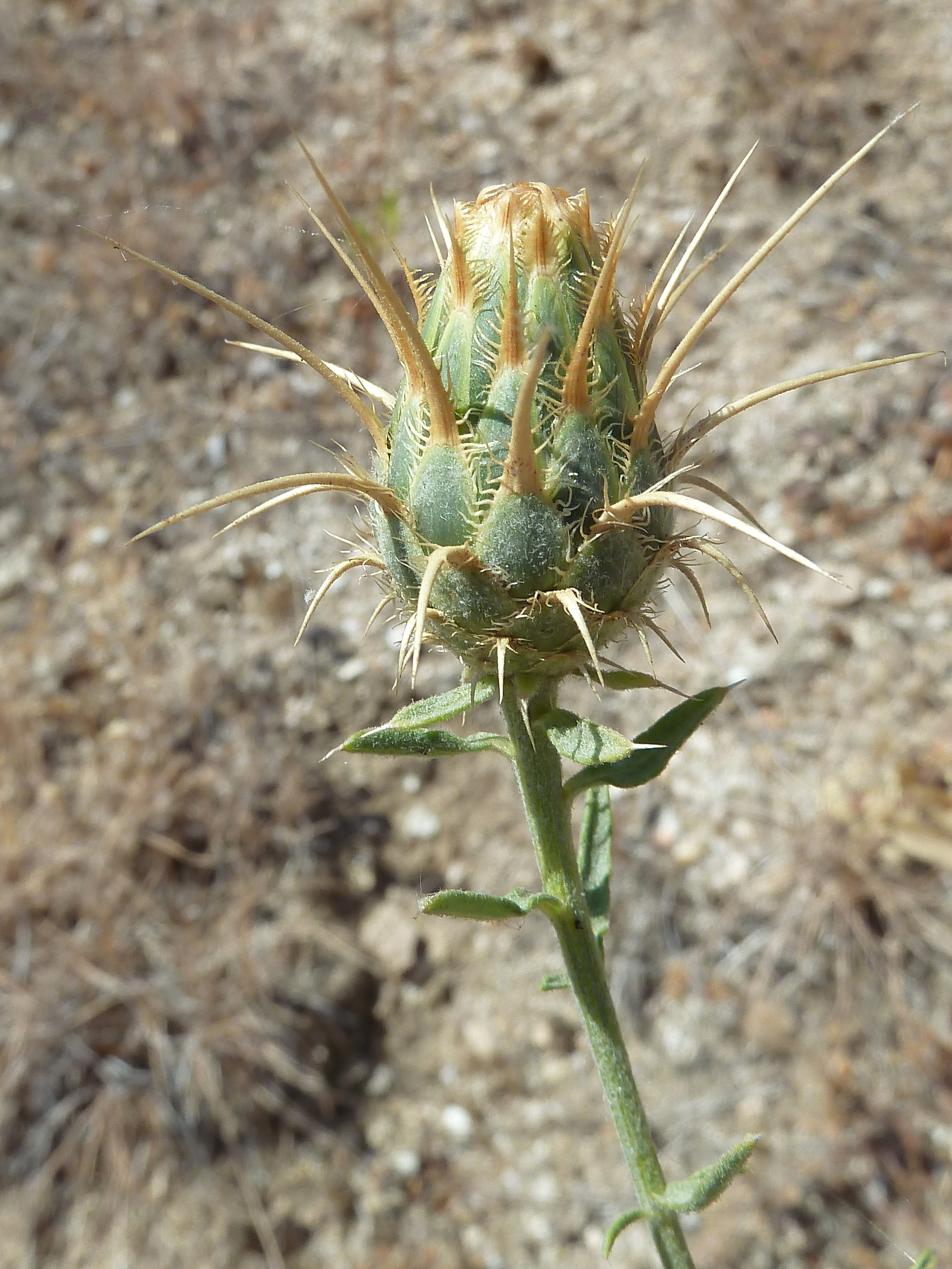 Centaurea ornata (Abrepuños) - Capítulo en preantesis. - Avda del Ventero de la Condesa, El Saceral, Madrid capital (España).